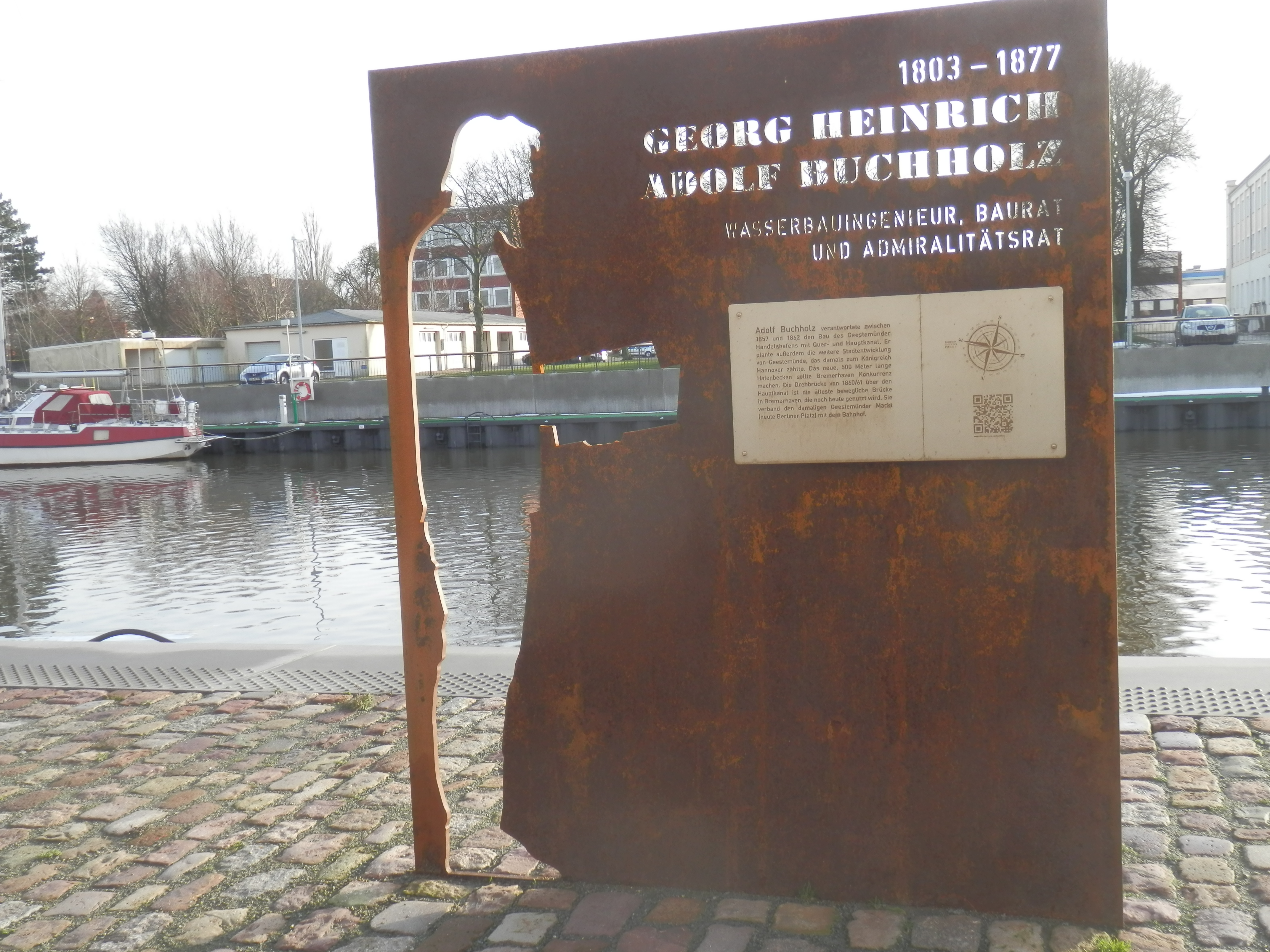 Infotafel zu Georg Heinrich Adolf Buchholz am Hauptkanal in Bremerhaven-Geestemünde